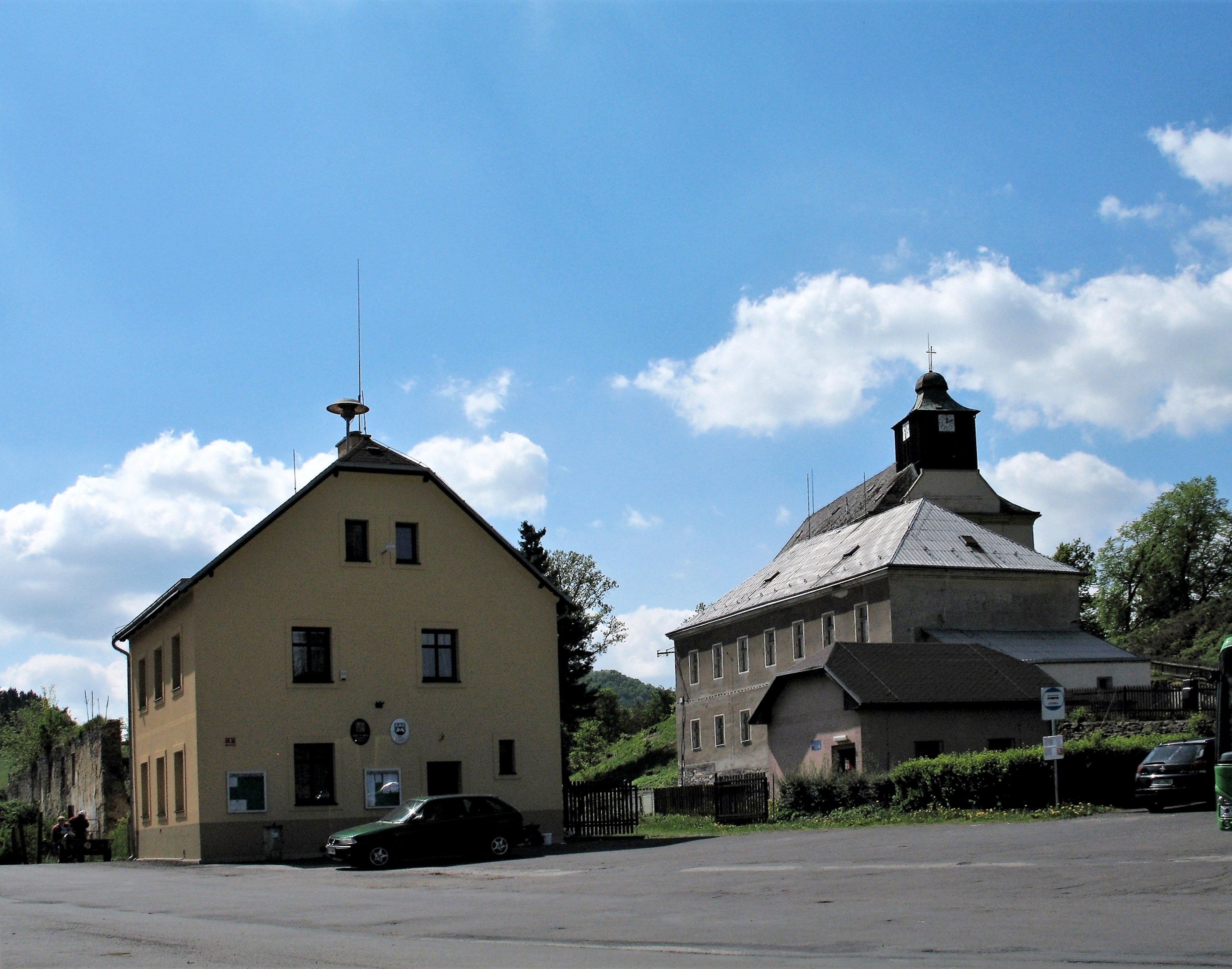 Obecní úřad, vpravo bývalá škola, přebudovaná na Mineralogické muzeum J. E. Hibsche